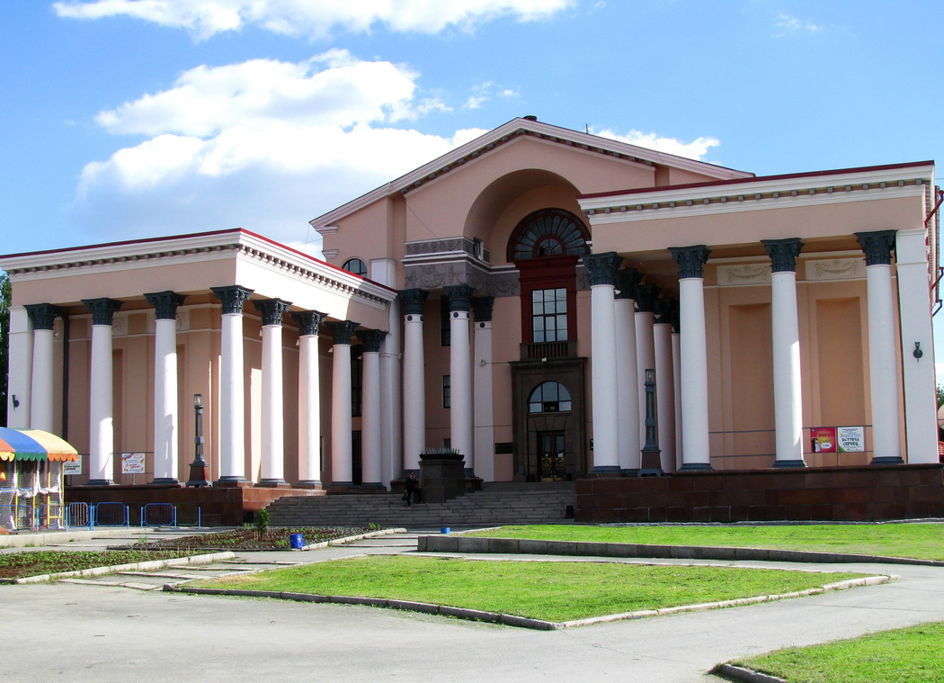 ДК Верх-Исетский в Екатеринбурге